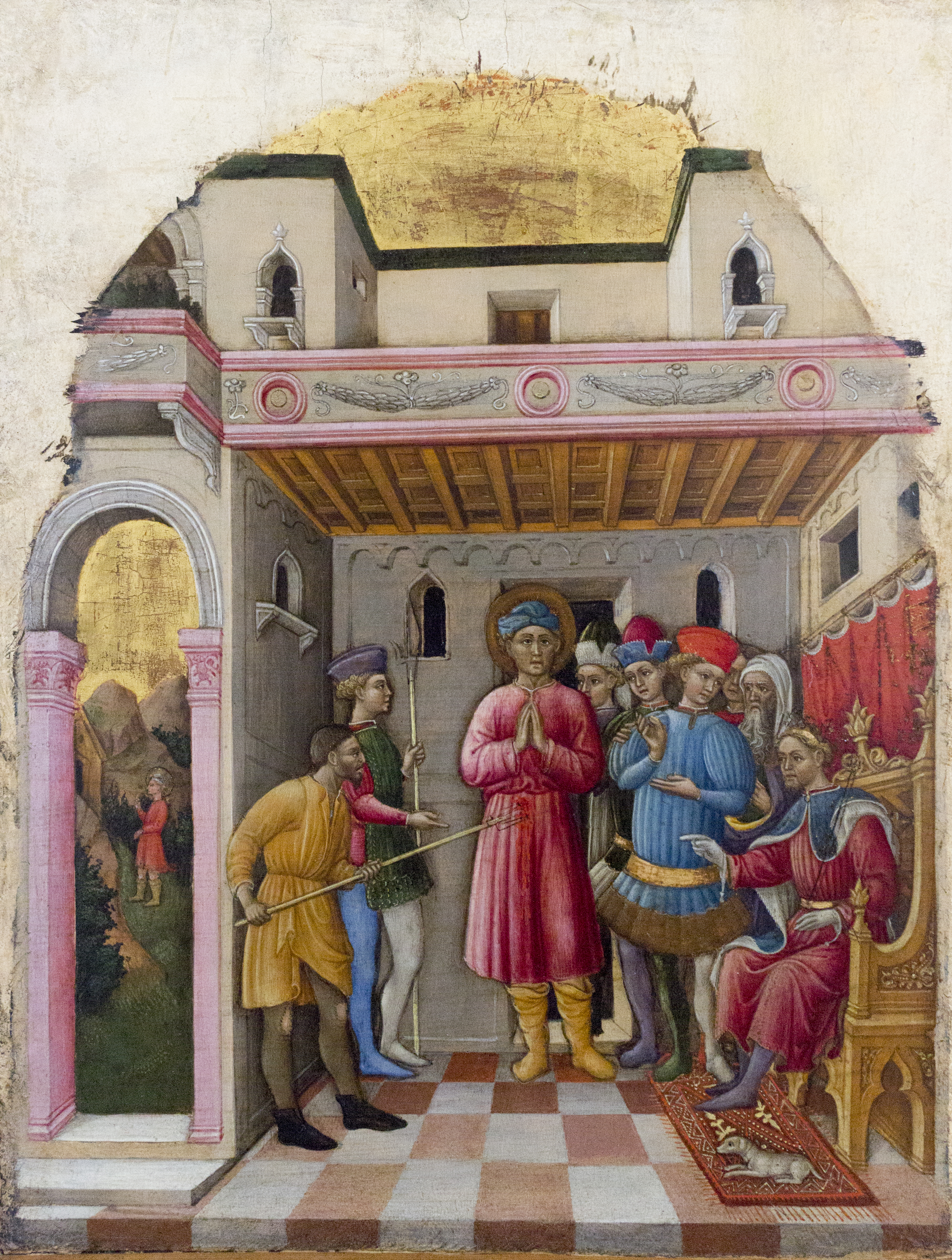 Il martirio di San Mamante, par Francesco dei Franceschi, exposé au Musée Correr de Venise en 2017.